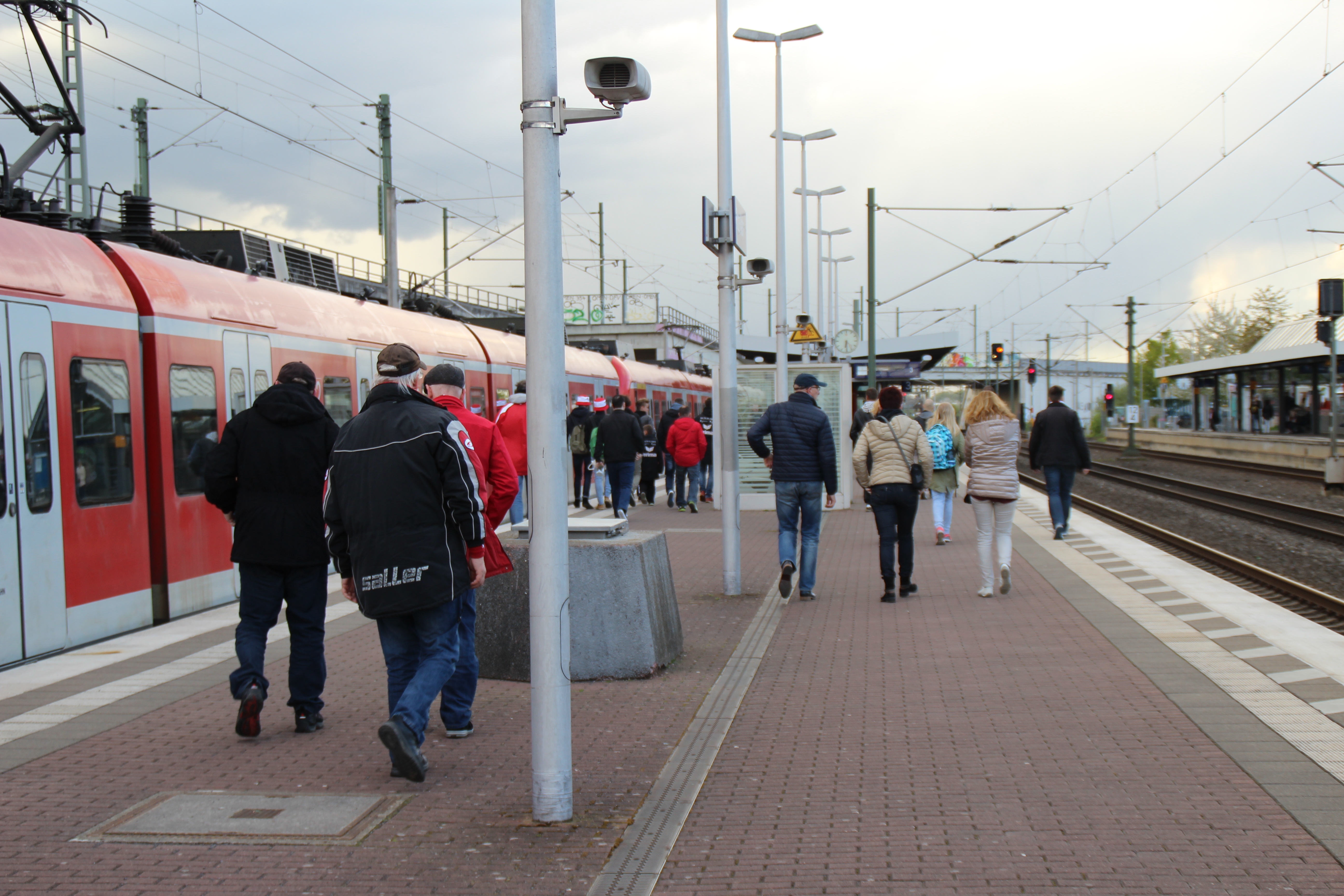 Aussteigende Fahrgäste aus der Linie S13 in Richtung Troisdorf